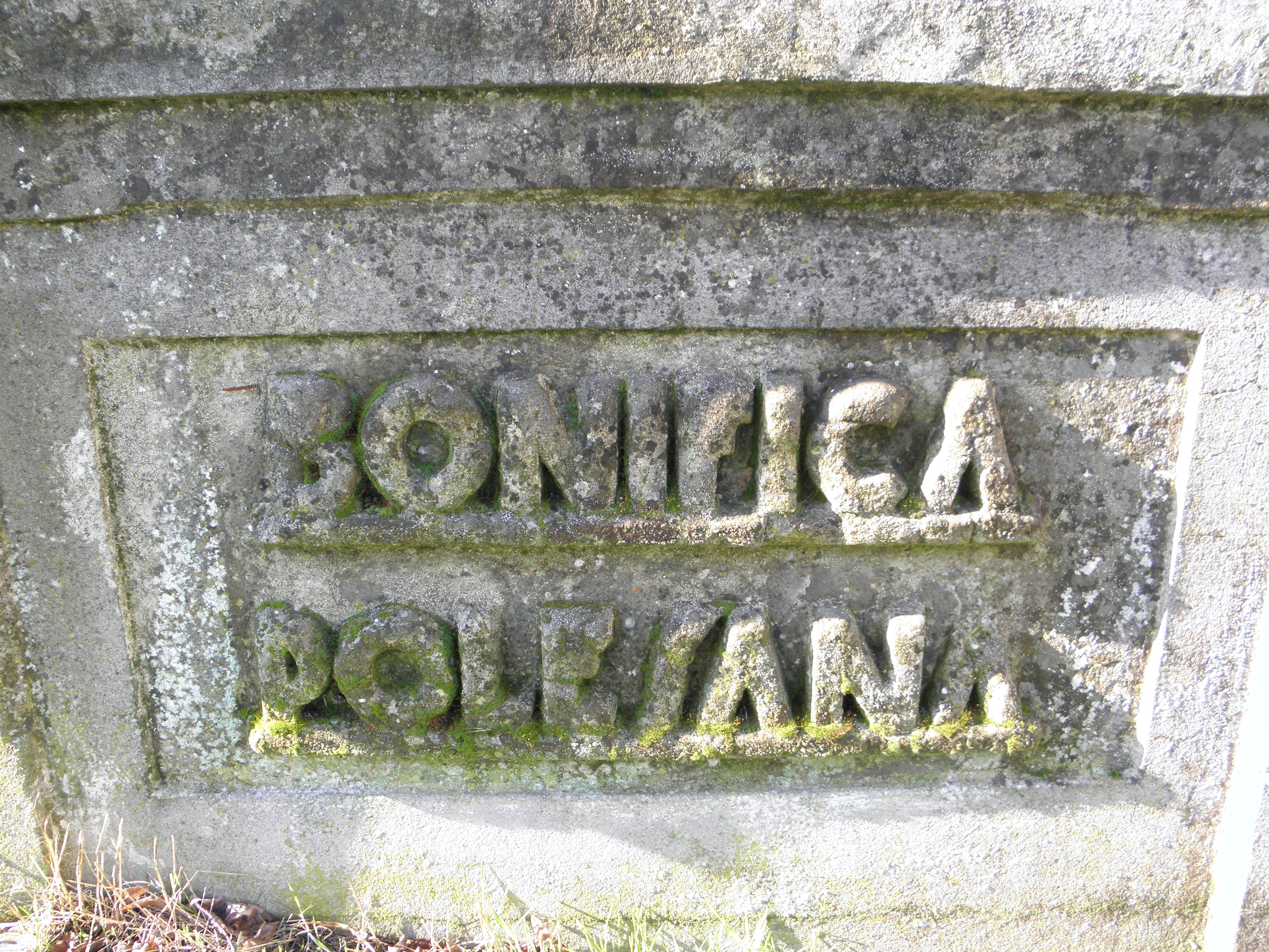 Bellombra, frazione di Adria, ponte sul canale.